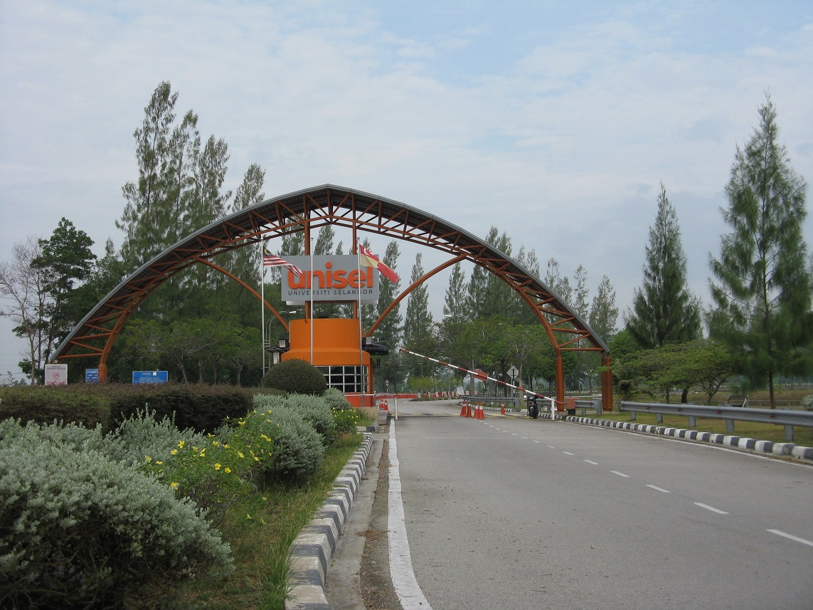 UNISEL - Universiti Selangor